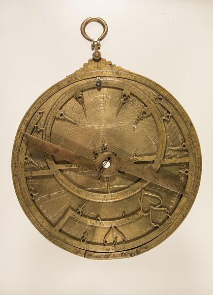 Astrolabio de Ibrahim ibn Said al-Sahli (Periodo de los Reinos Taifas). Número de inventario: 50762.